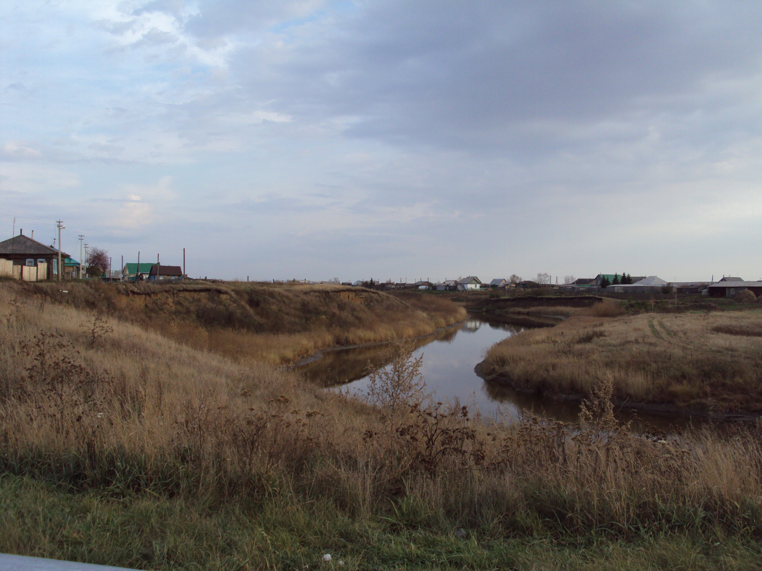 Вид на село Омутинское.